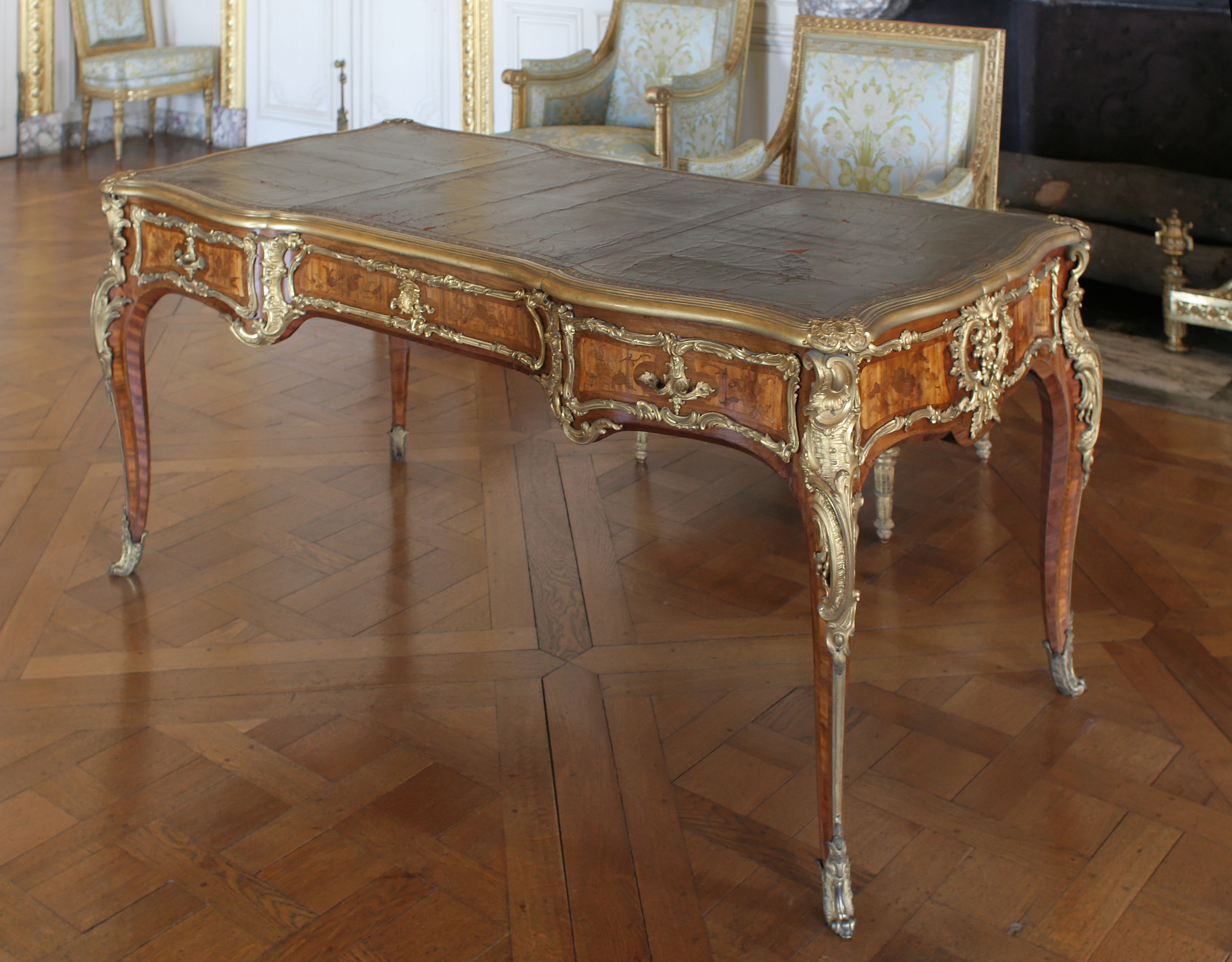 Château de Versailles, appartement du Dauphin, grand cabinet du Dauphin. Bureau du Dauphin plat à dessus de marocain noir, ornés de bronzes dorés à l'or moulu, marqueterie fond de bois d'Aramante, par Bernard II van Riesenbergh, 1745. inv. V3528;Vmb14355